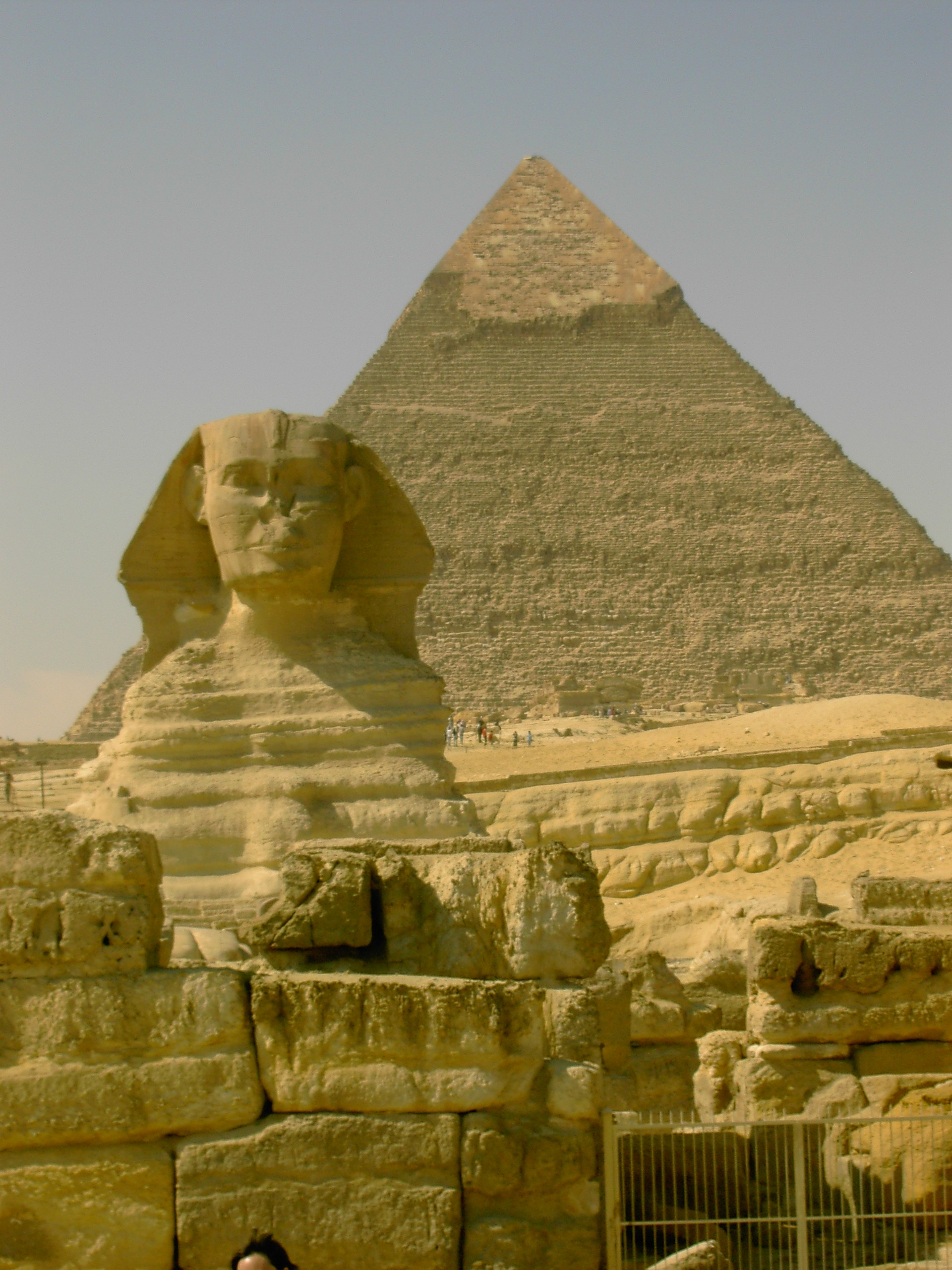 photo personnelle du caire